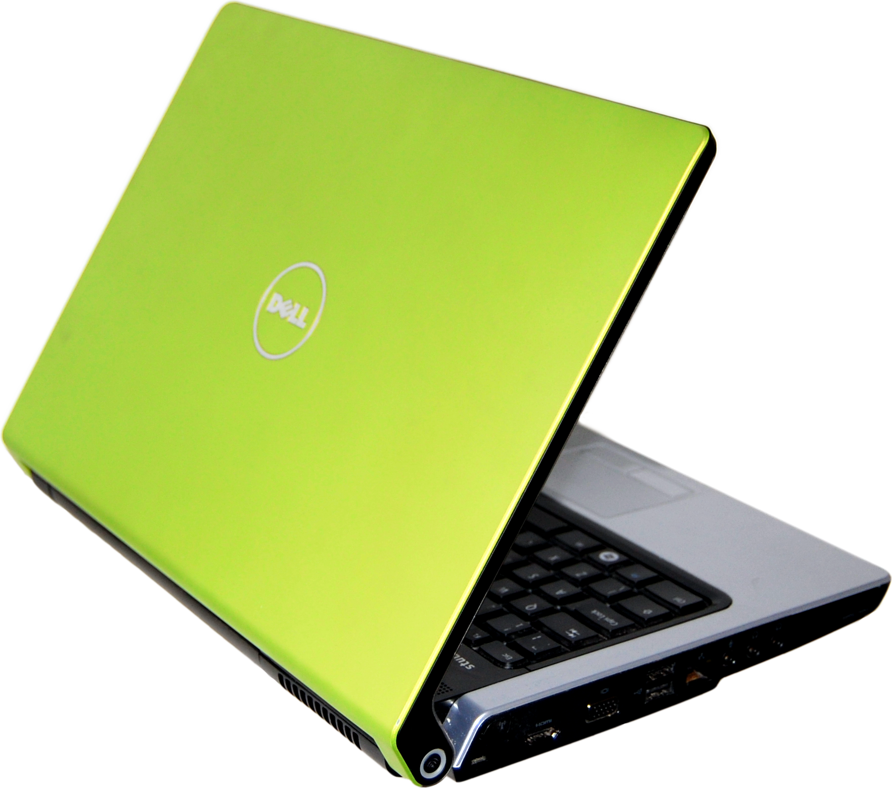 A Dell Studio 1535 laptop computer